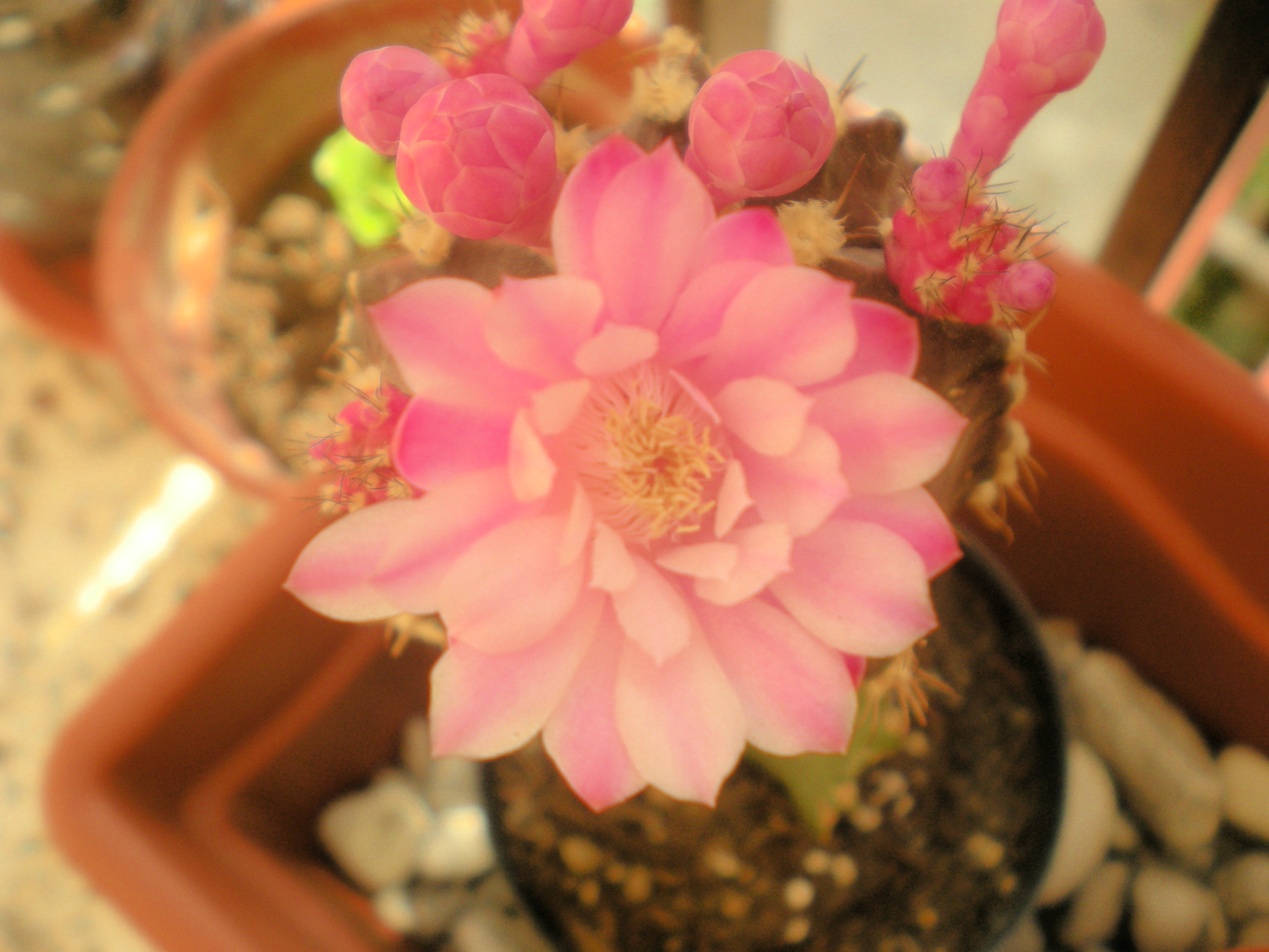 Fiore di Gymnocalycium mihanovichii